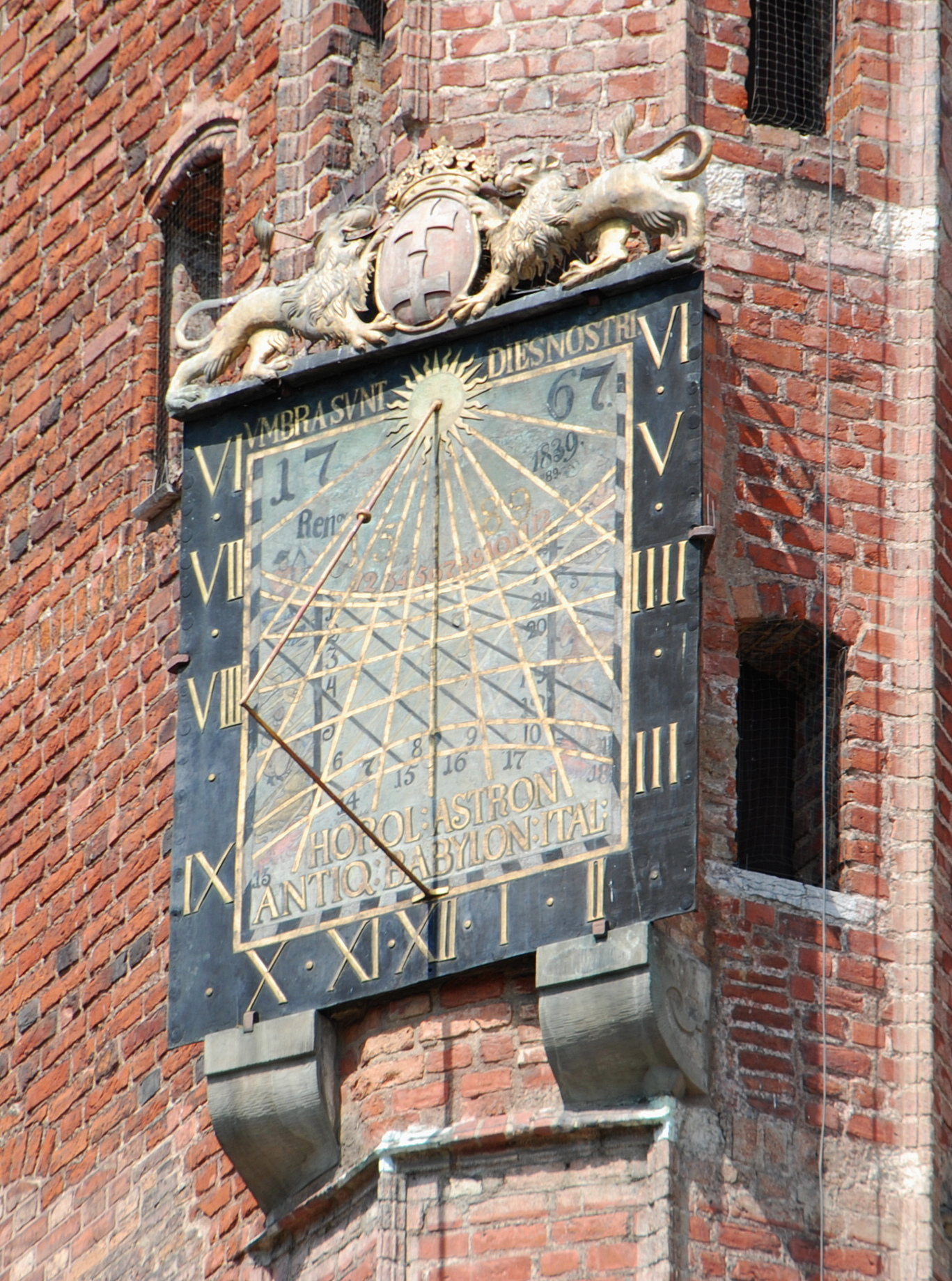 miasto Gdańsk